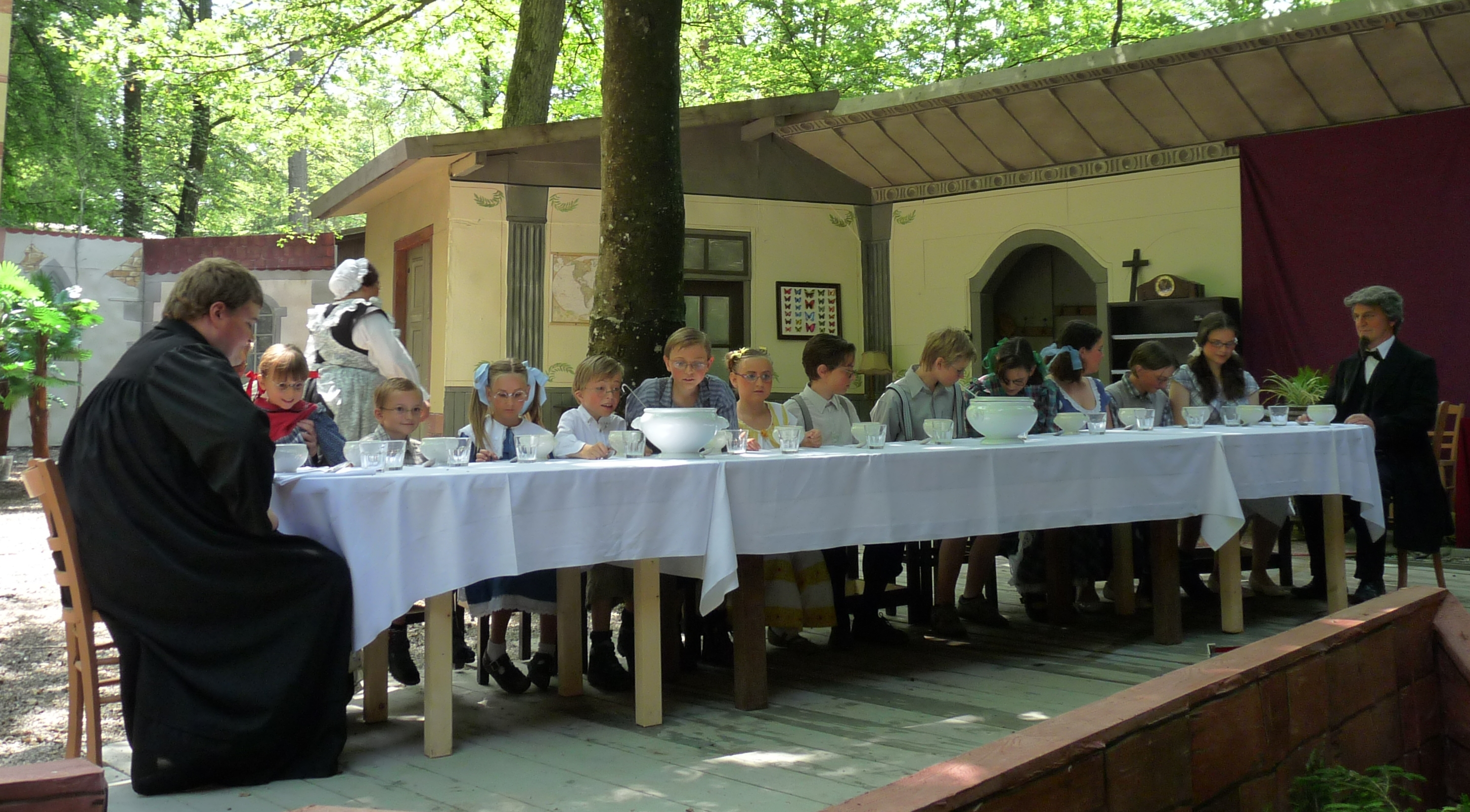 Professor Nägler und seine 12 Kinder (links im Bild: Pastor Riesling); Aufführung des Stückes "Das Haus in Montevideo" auf der Waldbühne Sigmaringendorf